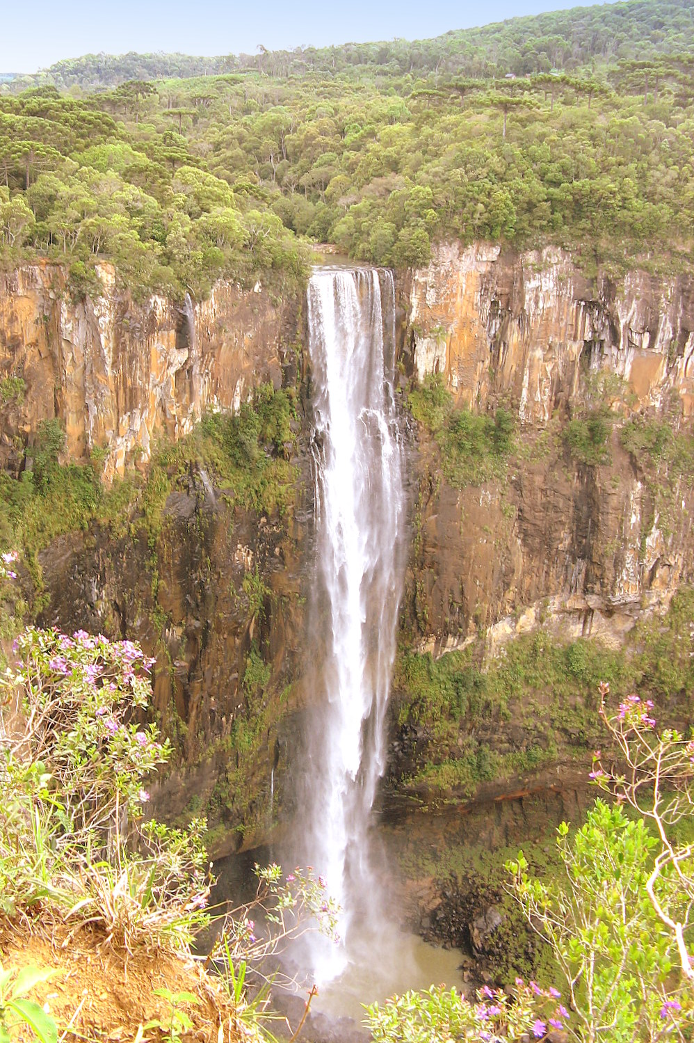 O Salto São Francisco é a maior queda d'água da região sul do Brasil, e uma das maiores do país. Está localizado numa tríplice fronteira entre os municípios de Guarapuava, Prudentópolis e Turvo, no estado do Paraná, dentro da Área de Preservação Ambiental da Serra da Esperança. Possui aproximadamente 196 metros de queda livre, o que equivale a um prédio de 60 andares, onde a água transforma-se em névoa antes de tocar no chão.